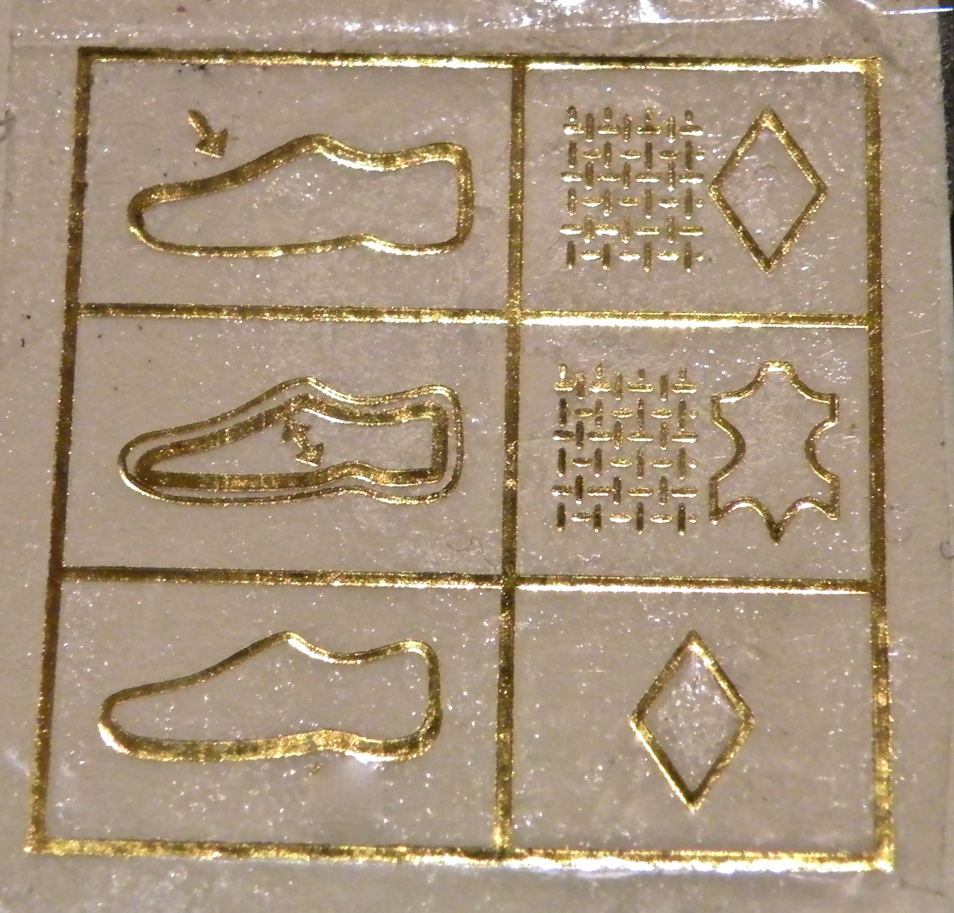 étiquette de composition de chaussure